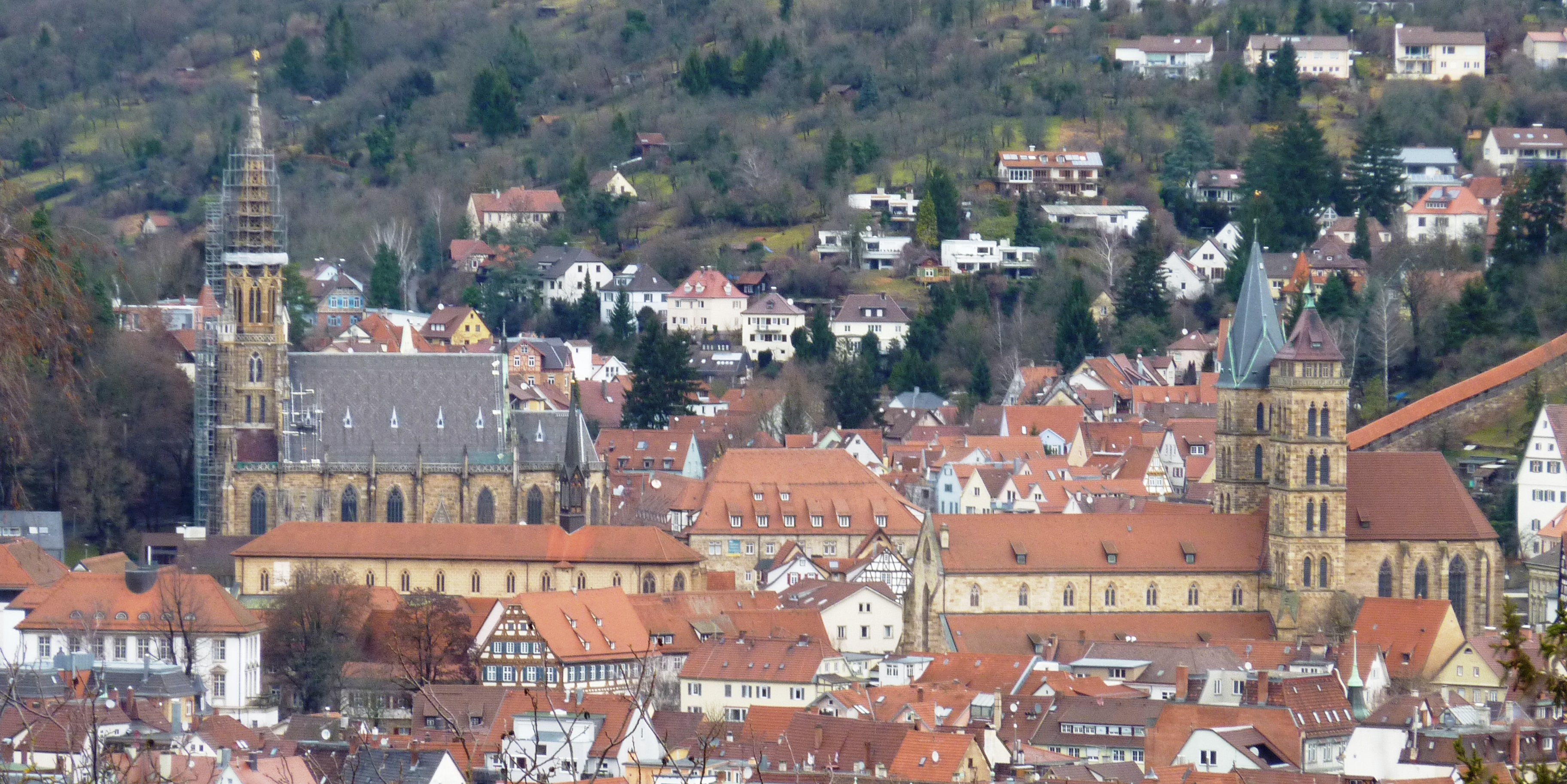 links die Frauenkirche, davor das Münster St. Paul, rechts die Stadtkirche St. Dionys, Esslingen